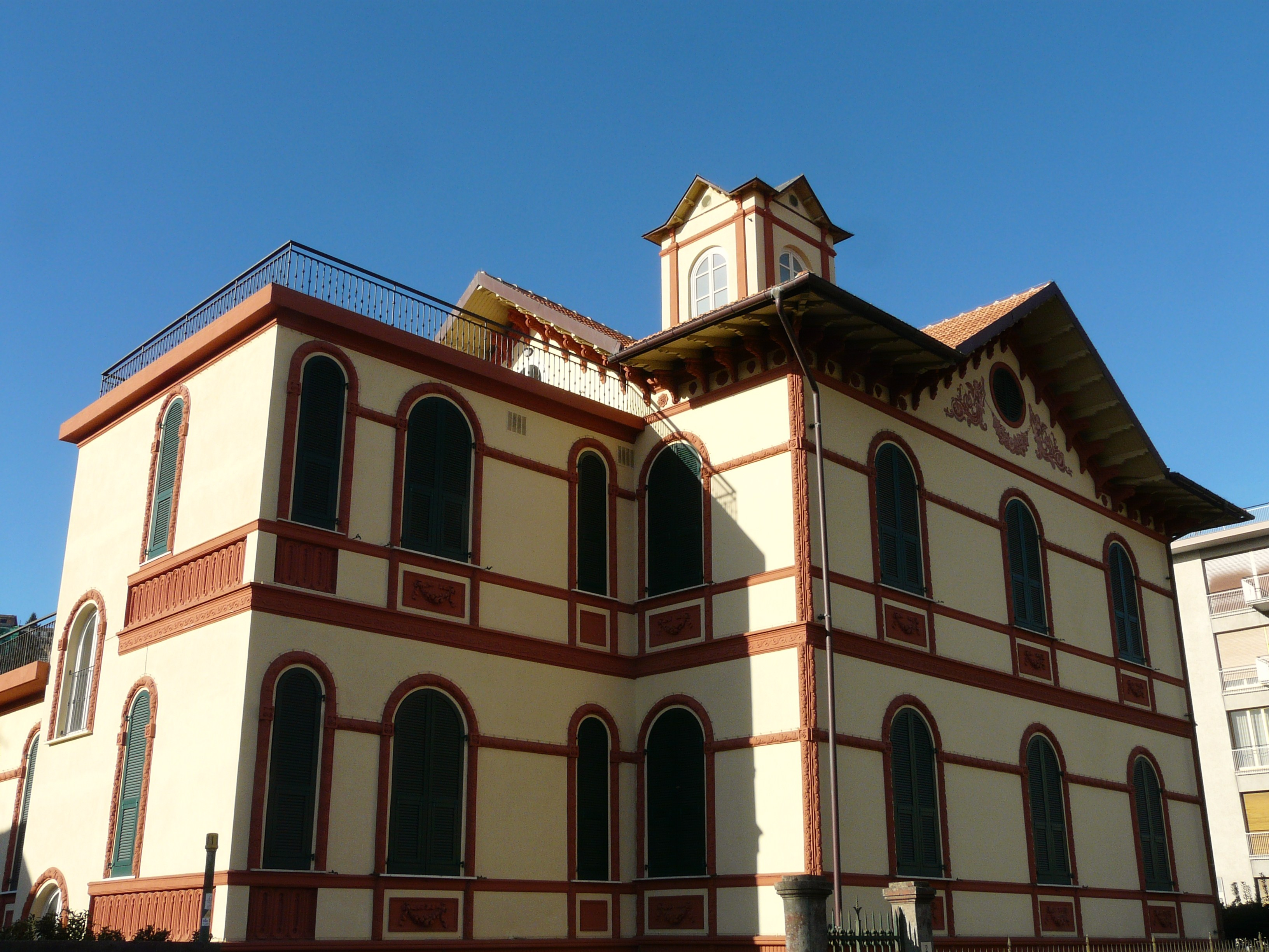 Villa Queirolo, Rapallo, Liguria, Italia